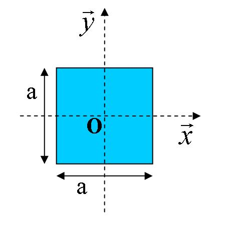 Schéma de l'utilisation des formules générales du moment quadratique pour une section carrée. Auteur: Xavier Lory